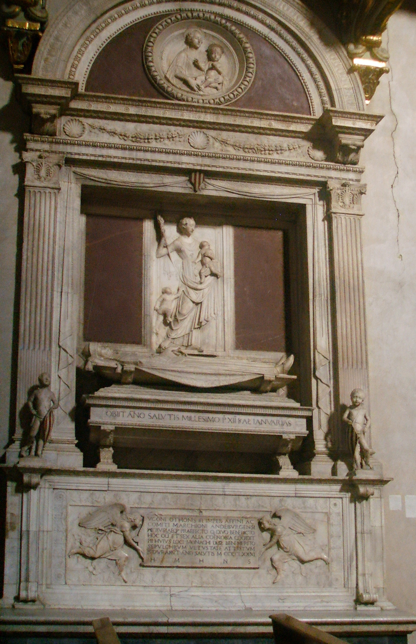 Badia Fiorentina church mino_da_fiesole,_monumento_al_conte_ugo_di_toscana in Florence, italy Mino da Fiesole (1429–1484) Alternative names Mino di Giovanni; Mino da PoppioDescriptionItalian sculptorDate of birth/death 1430 or 1431 date QS:P,+1430-00-00T00:00:00Z/8,P1319,+1430-00-00T00:00:00Z/9,P1326,+1431-00-00T00:00:00Z/9 11 July 1484 Location of birth/death Poppi, Arezzo FlorenceAuthority control : Q477441 VIAF: 59359471 ISNI: 0000 0001 2358 5986 ULAN: 500002074 LCCN: no99057270 WGA: MINO DA FIESOLE WorldCat creator QS:P170,Q477441